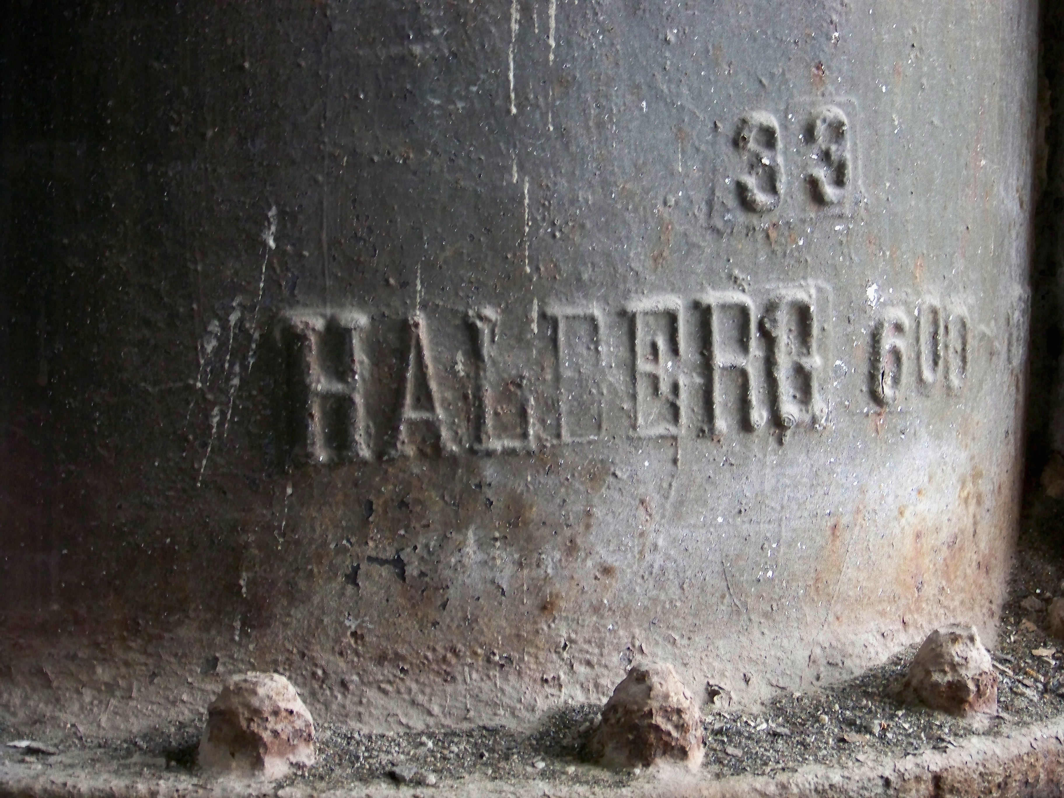 Alte 600-mm-Rohrleitung mit Herstellervermerk Halberg im Wasserturm der ehmaligen Celluloid-Fabrik in Eilenburg